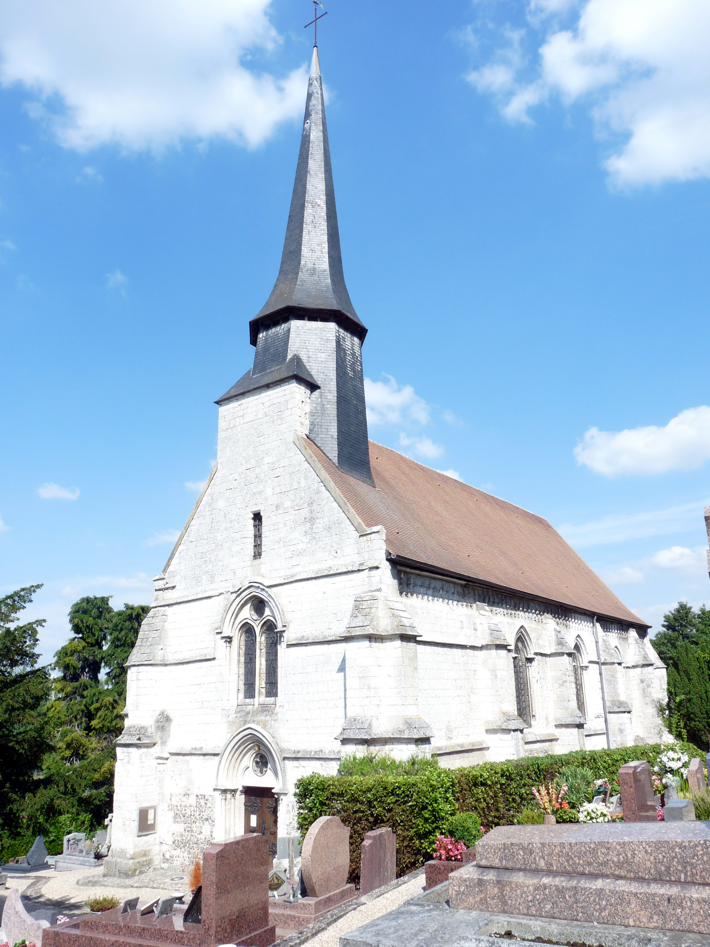 Église Saint-Jacques-le-Majeur de Moulineaux (Classé) .